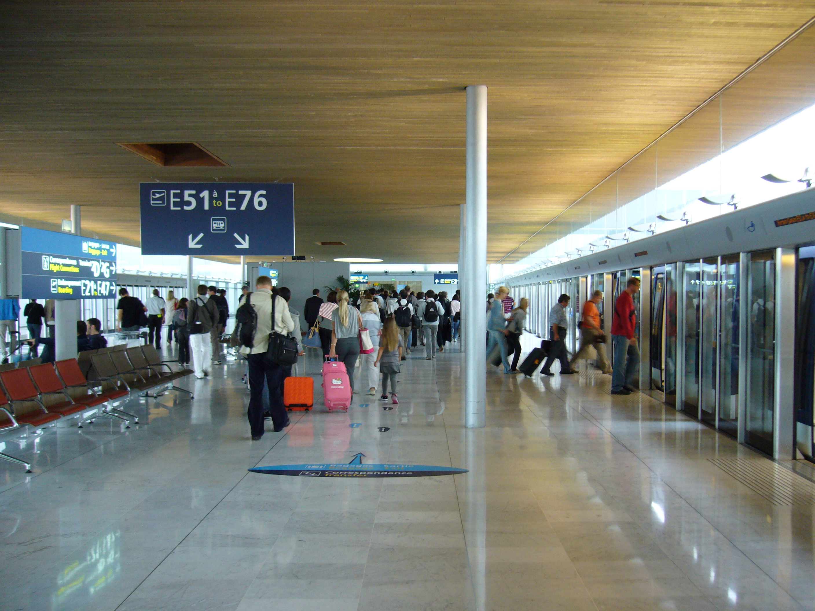 Val LISA à l'aéroport CDG.